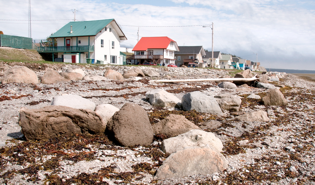 Port-Menier, Ile-d'Anticosti, Québec.